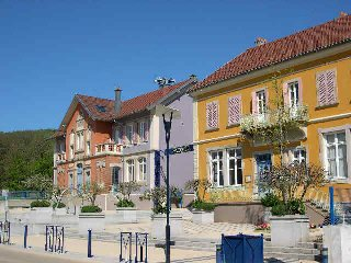 Village de Cravanche (Territoire de Belfort) Photo prise par LP90 en mai 2004 Licence GFDL LP90